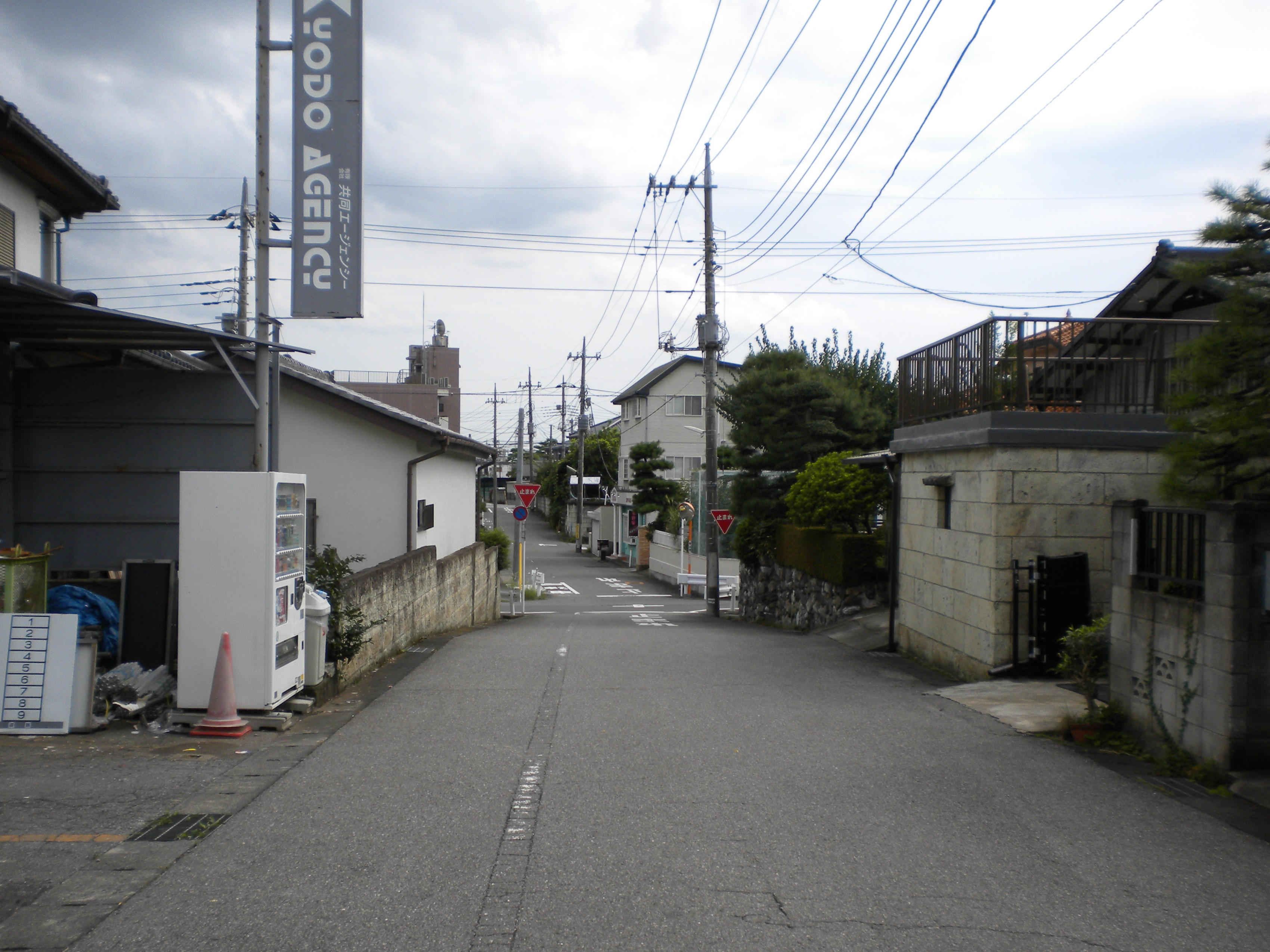 栃木県宇都宮市弥生1丁目